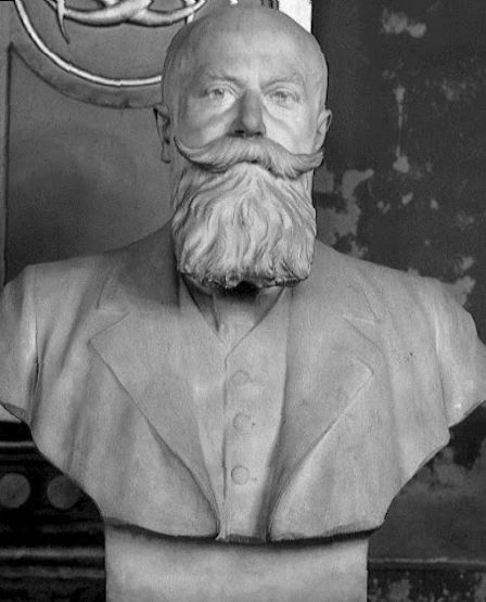 Ronde-bosse en marbre